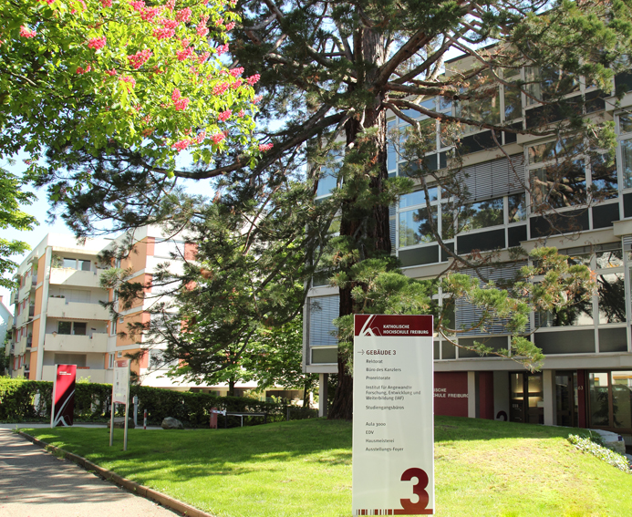 Ansicht Gebäude 3 der Katholischen Hochschule Freiburg von der Karlstraße aus